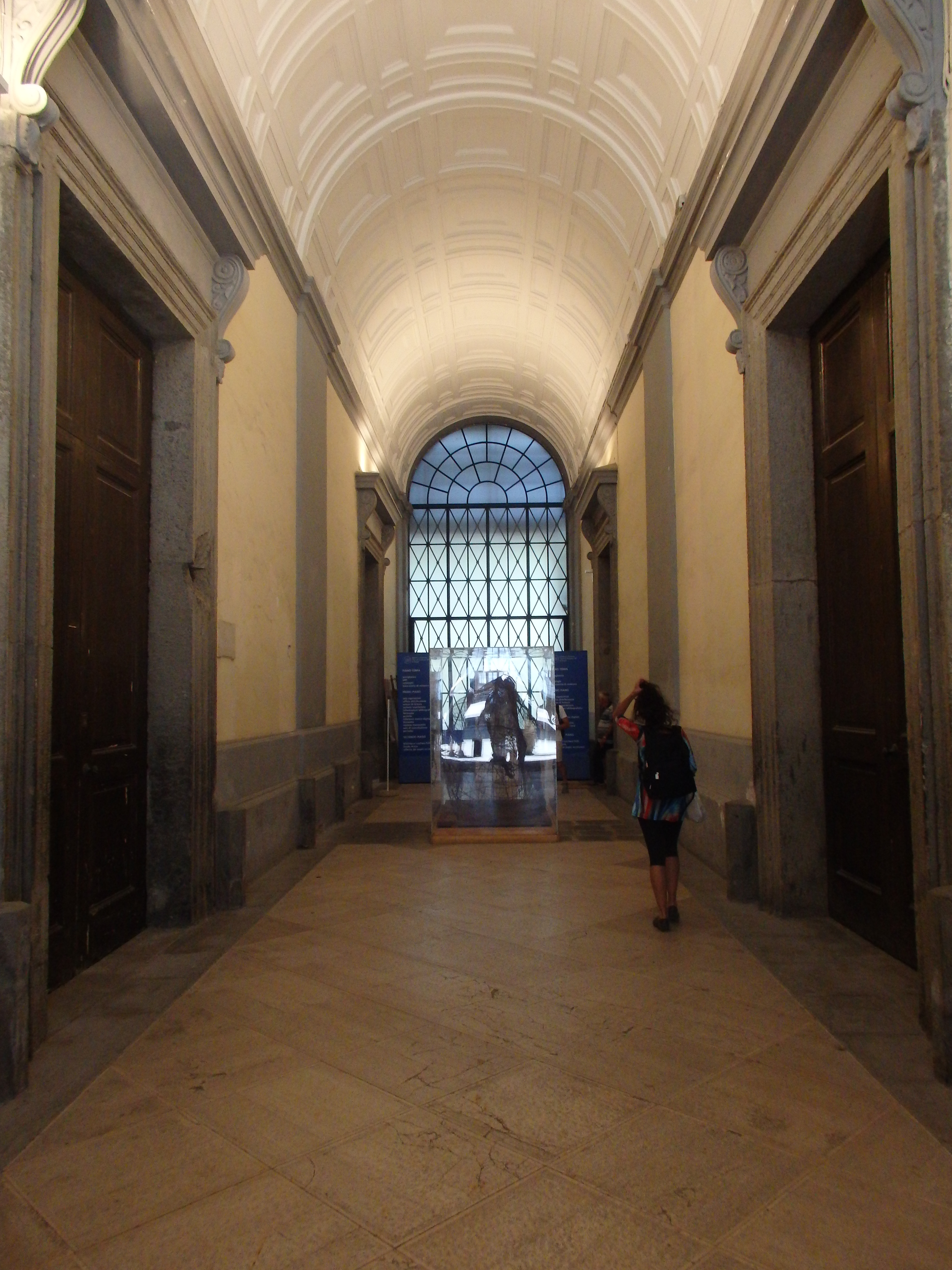 Ingresso e interni della biblioteca nazionale di Napoli.